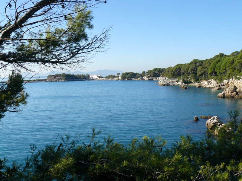 Anse de l'Argent-Faux, dite baie des milliardaires, cap d'Antibes, France